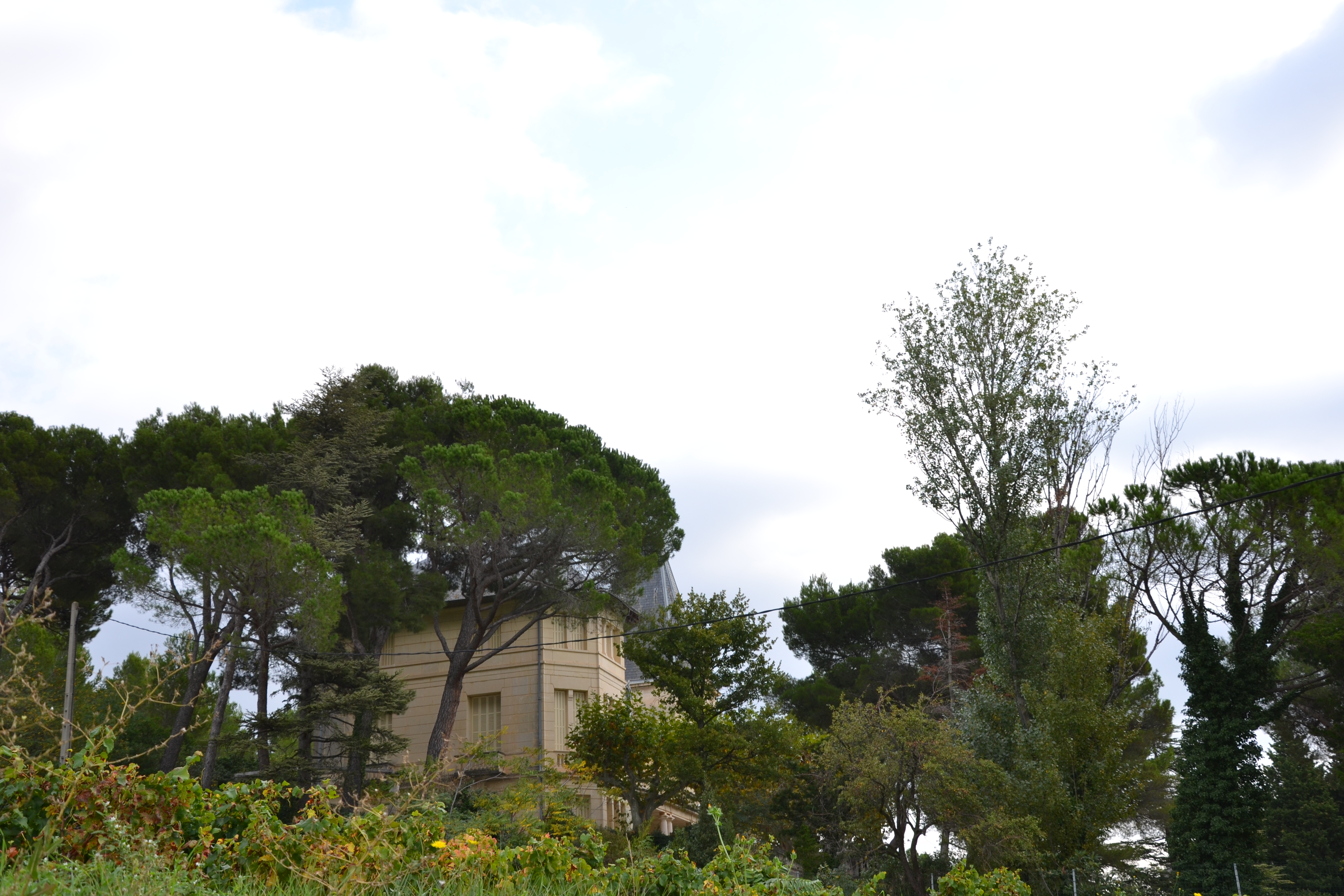 Château de Montmirail, près des thermes de Montmirail